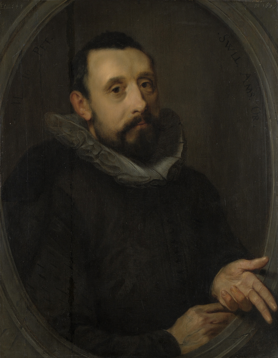 schilderij; portret; mansportret; Sweelinck, Jan Pietersz.